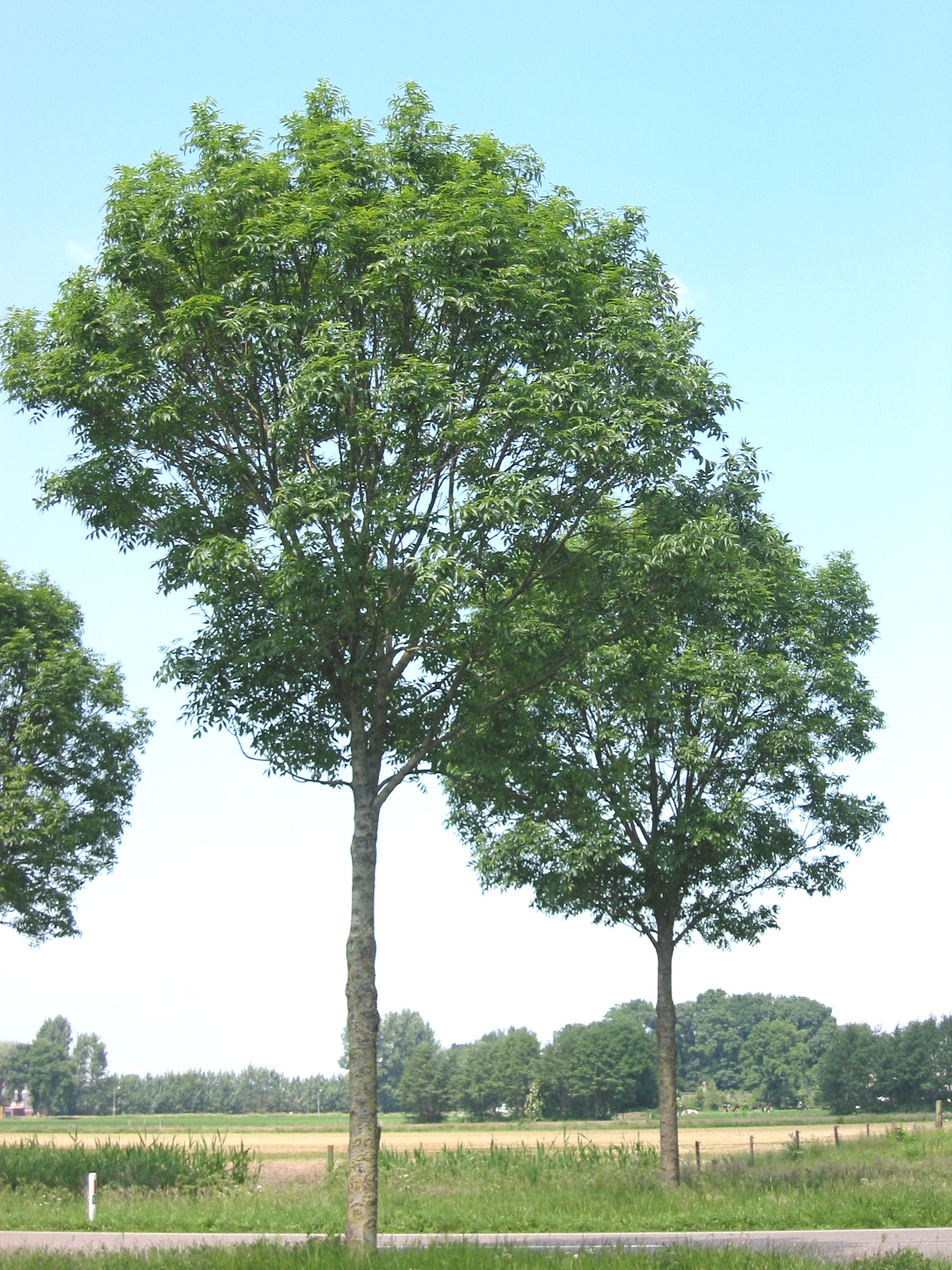 Fraxinus excelsior trees (Es).